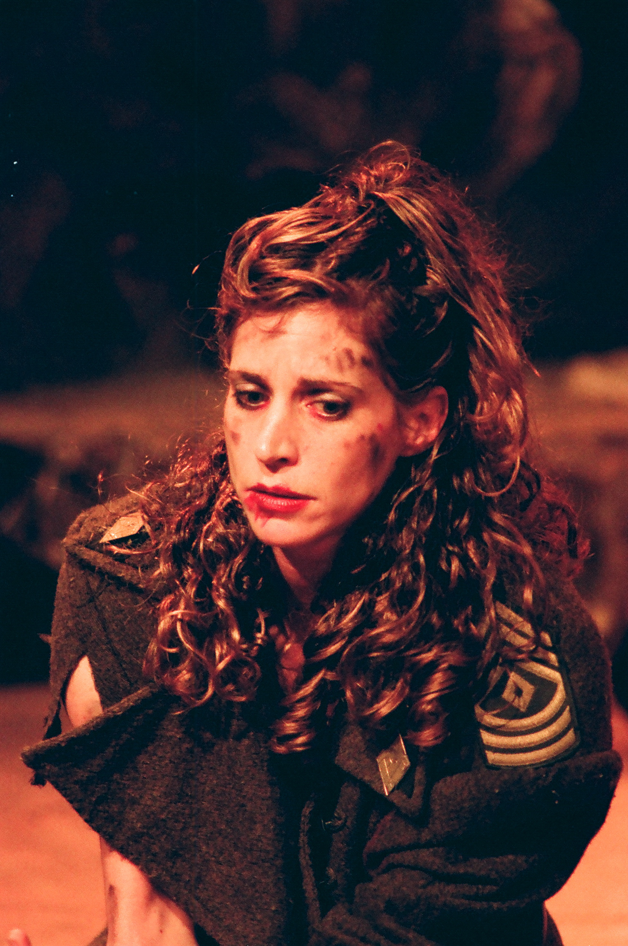 הגבול והשיבה 2